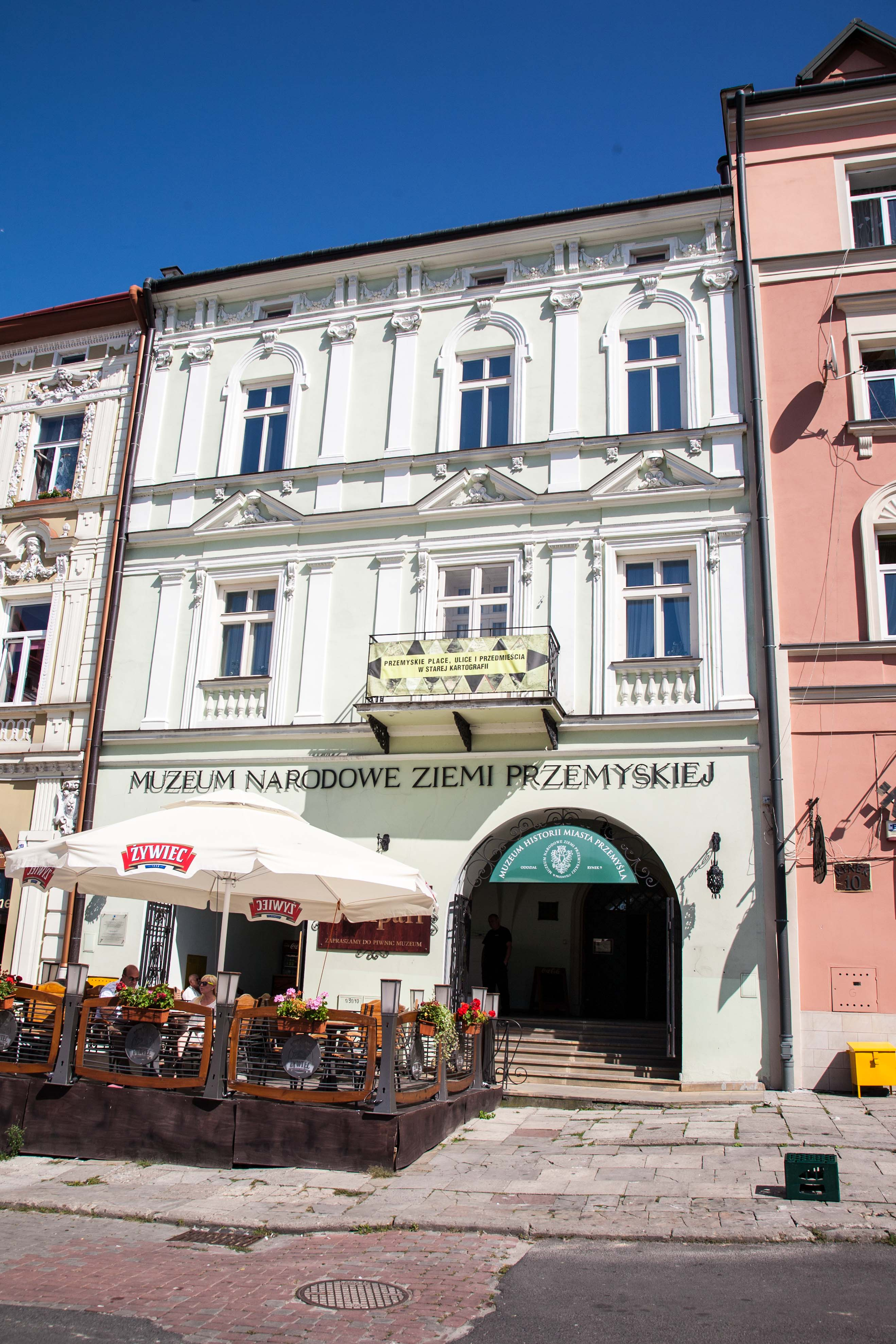 Przemyśl, Rynek 9 - dom, XVI/XVII